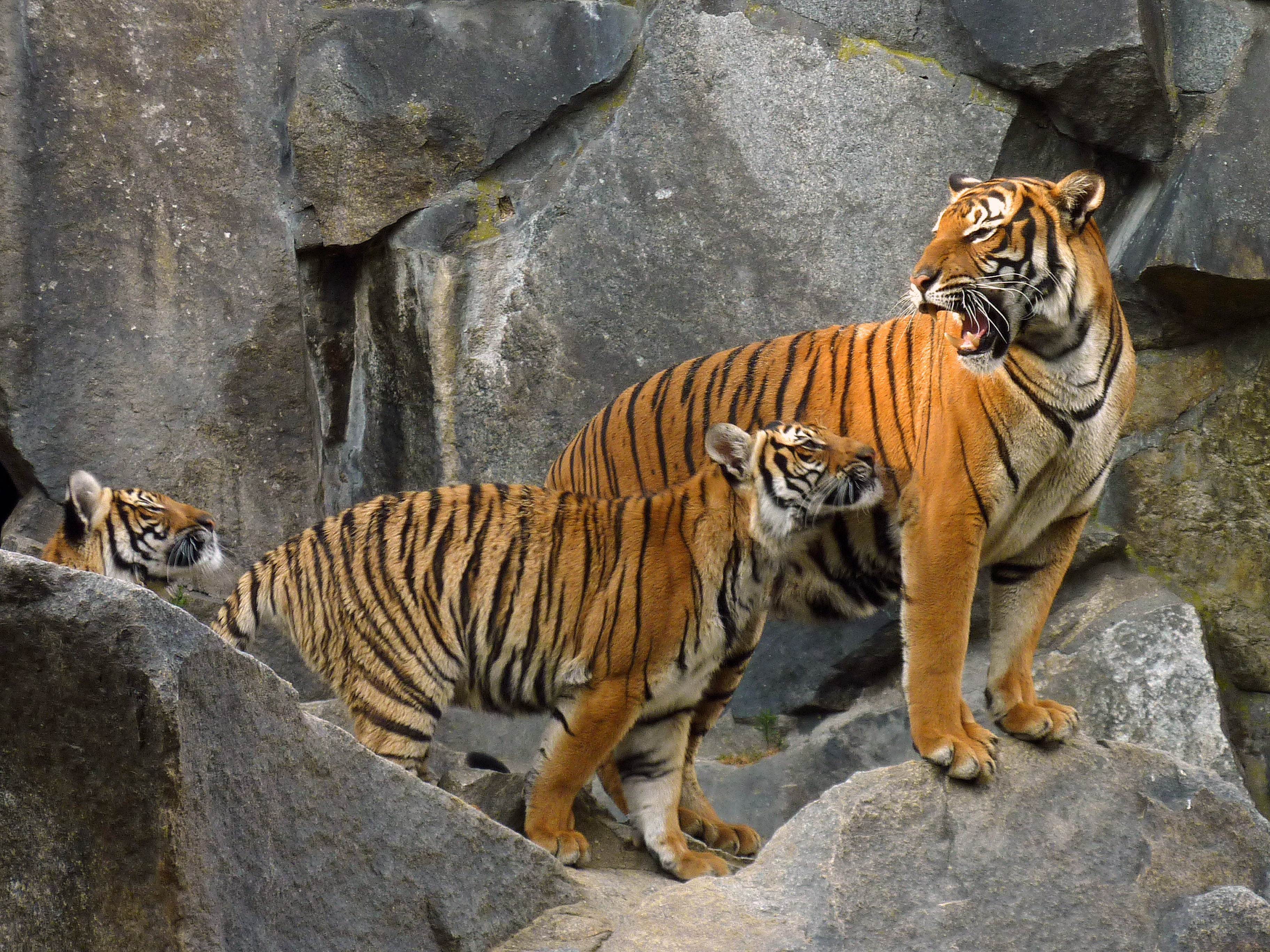 Hinterindische Tiger (Indochina-Tiger) in der großen westlichen Freianlage des Alfred-Brehm-Hauses im Tierpark Berlin-Friedrichsfelde